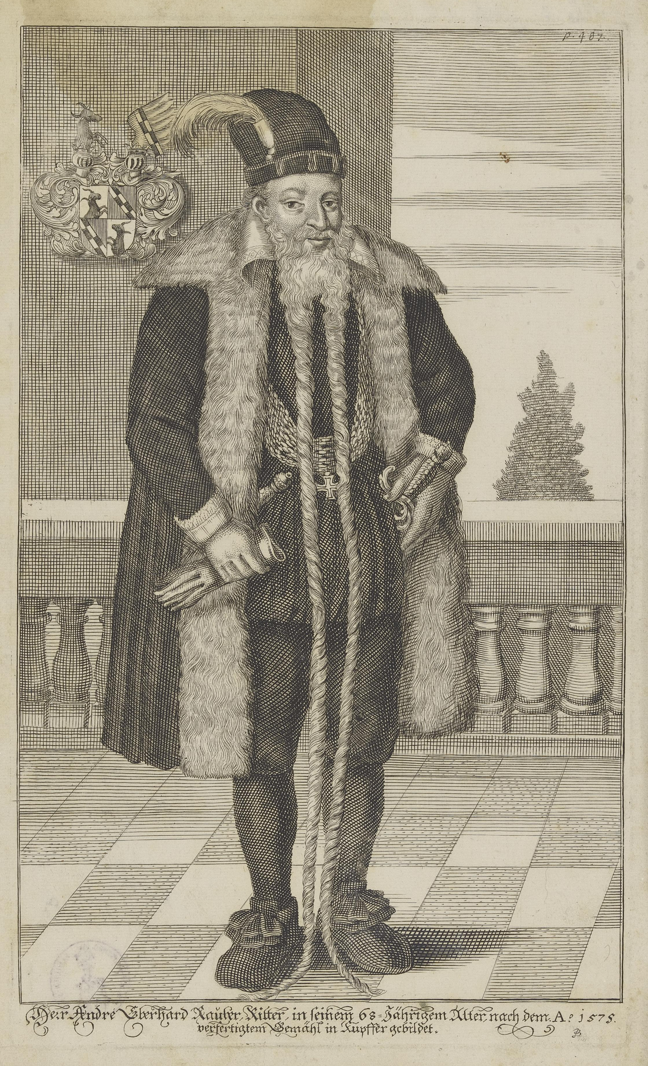 Bildnis des André Eberhard Rauber Nürnberg, Germanisches Nationalmuseum, Graphische Sammlung, Inventar-Nr. MP 19377, Kapsel-Nr. 340